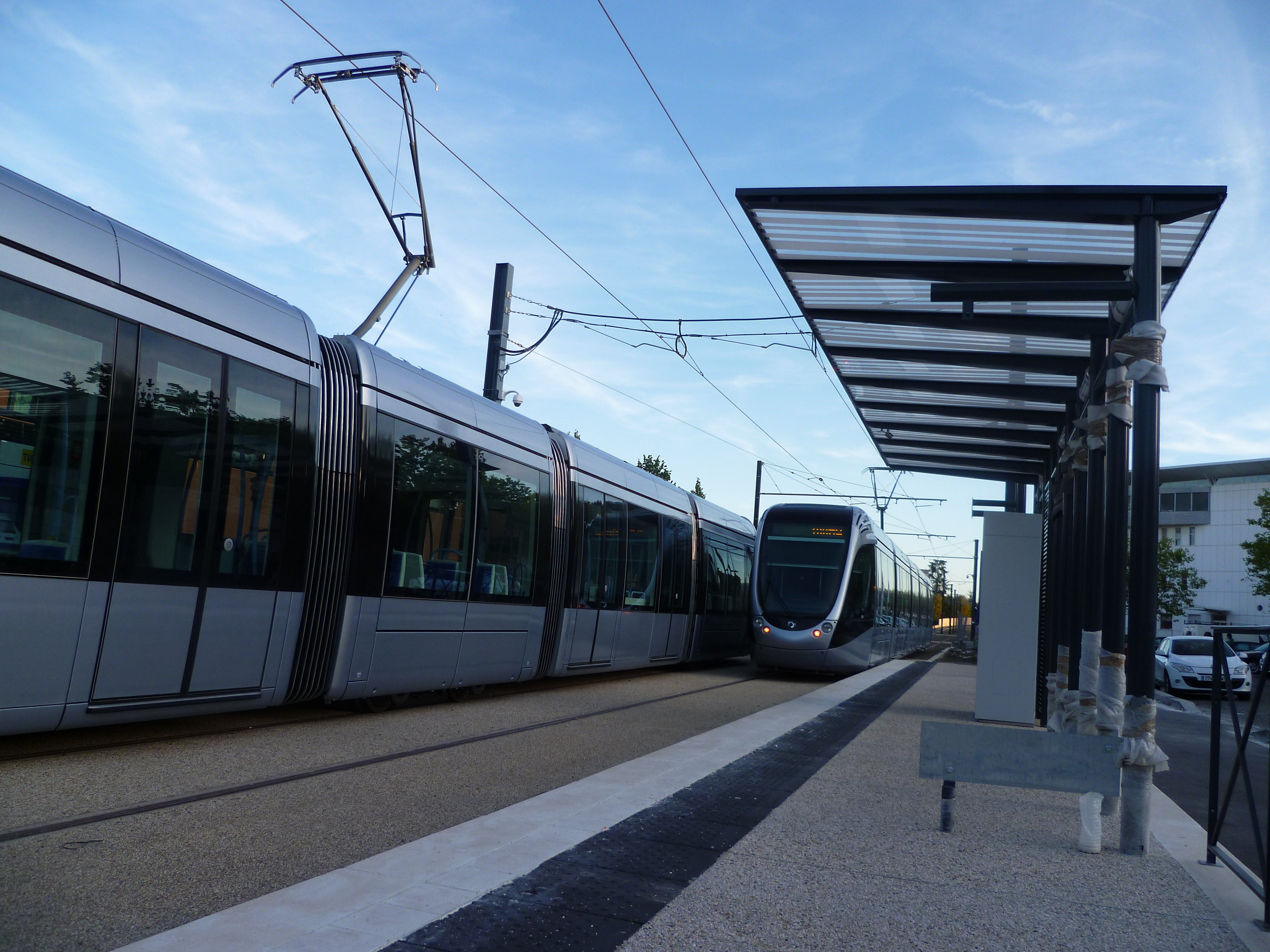 Le tram de Toulouse en test à la station Purpan.